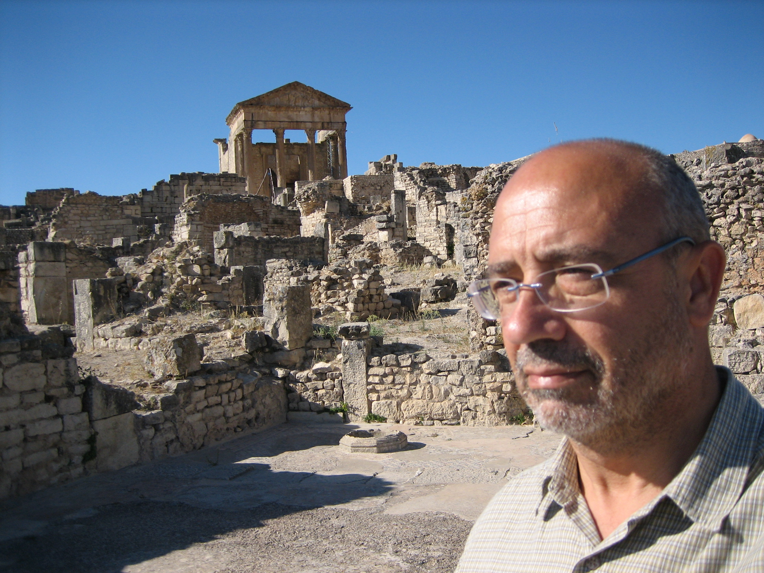 Francesc Xavier Hernàndez (Didàctica del Patrimoni)